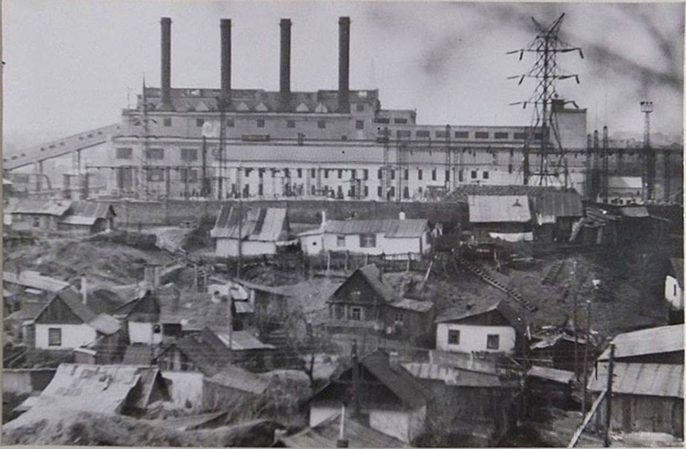 Беларуская (тарашкевіца): Менск (Miensk), Тры Карчмы (Try Karčmy). ТЭЦ-2